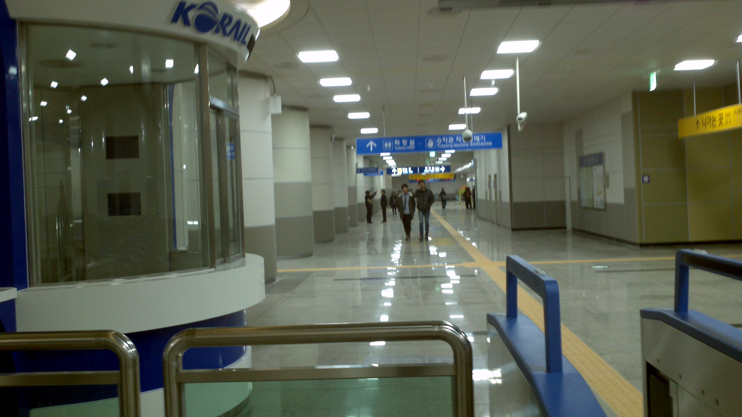 신갈역 대합실